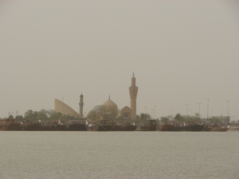 فاو-اروندکنار